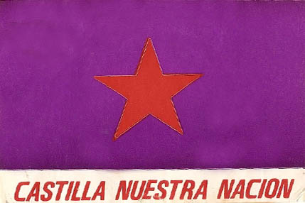 Adhesivo publicitario de Castilla nuestra nación, nacionalismo castellano